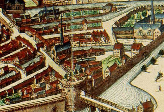 Extrai de la Carte de Liège représentant l'Hôpital et la chapelle Saint Julien en Outremeuse